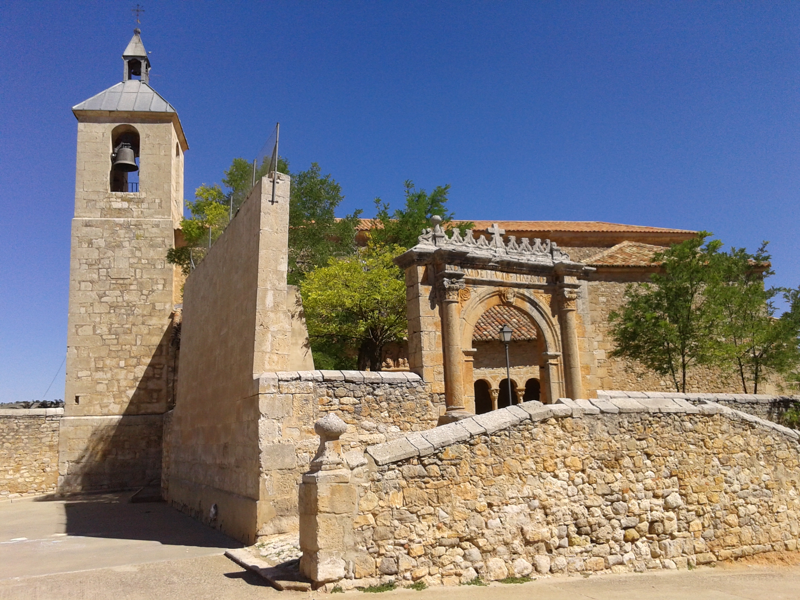 Vista de la Iglesia de Villasayas